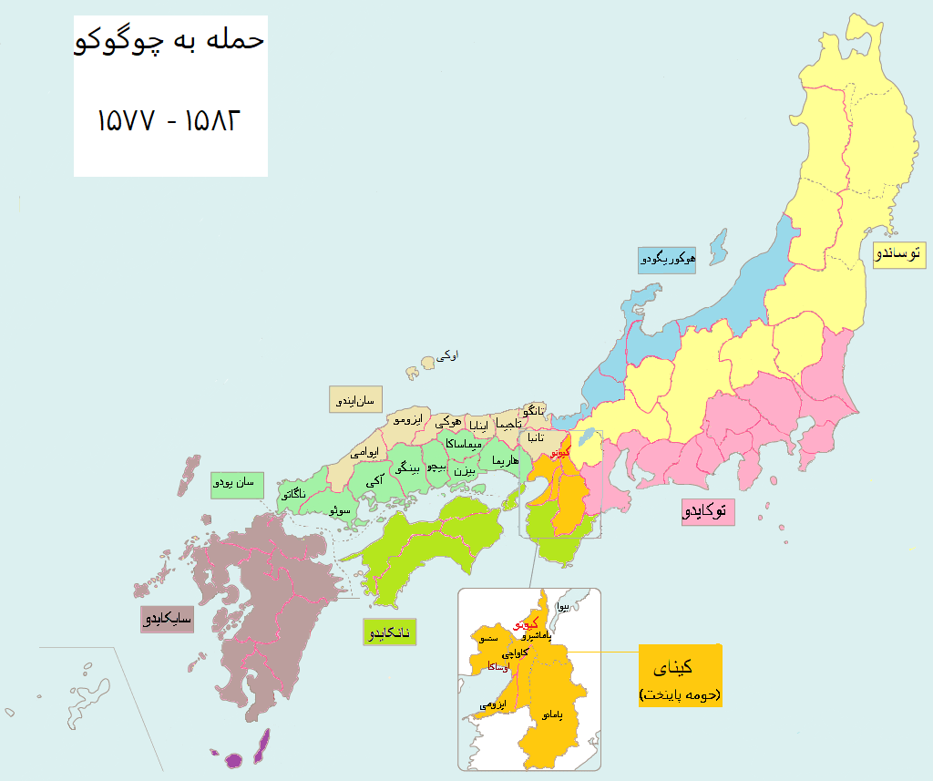 ولایت های منطقه چوگوکو در ژاپن